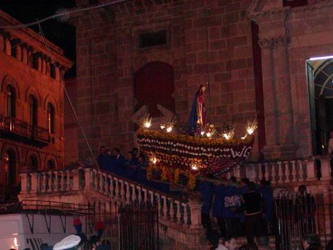 Barca Infiorata a Caltanissetta.